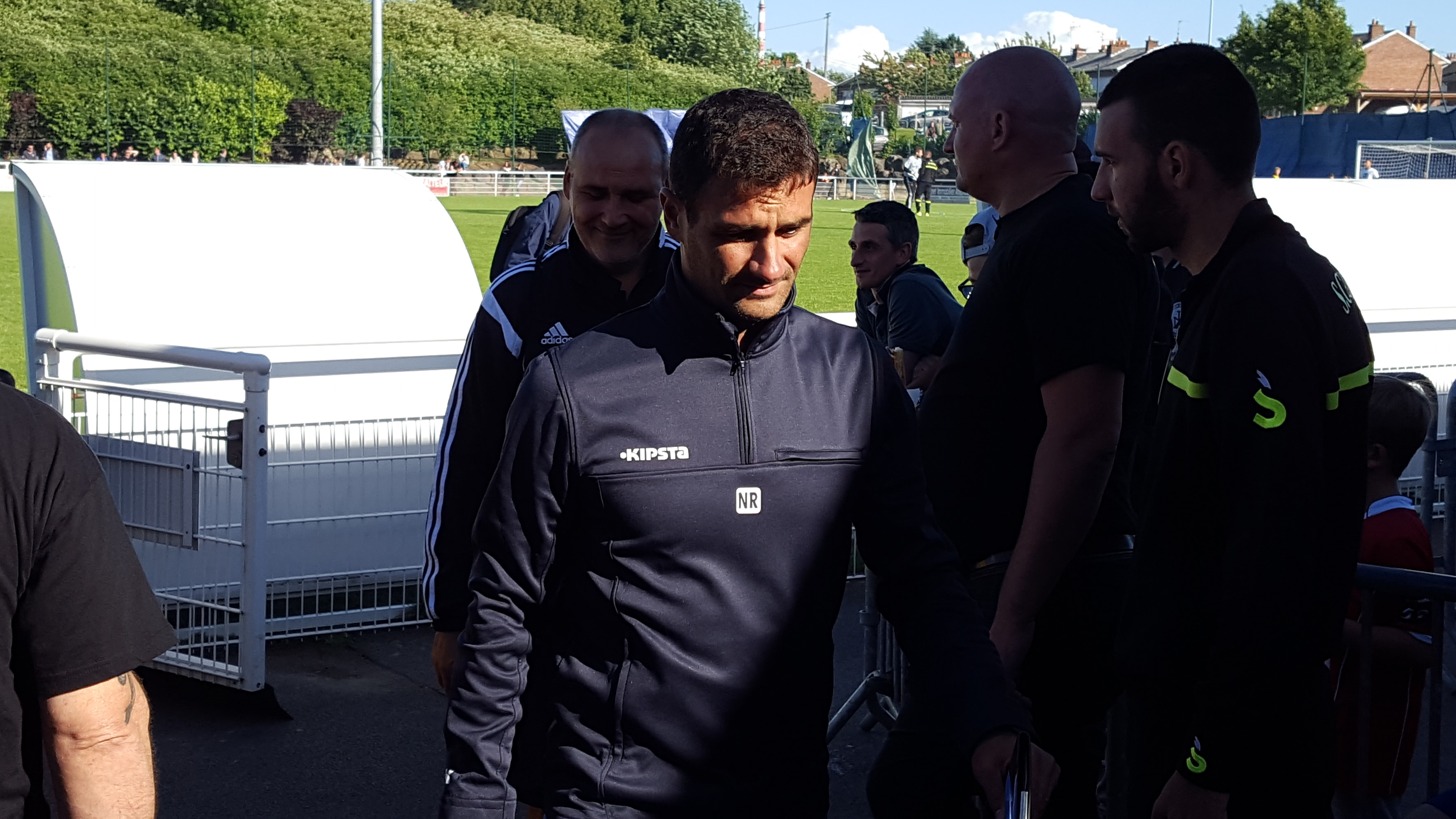 Nicolas Rabuel lors du match amical Valenciennes / UNFP FC, le 2 juillet 2016, au Stade des Navarres à Aniche.